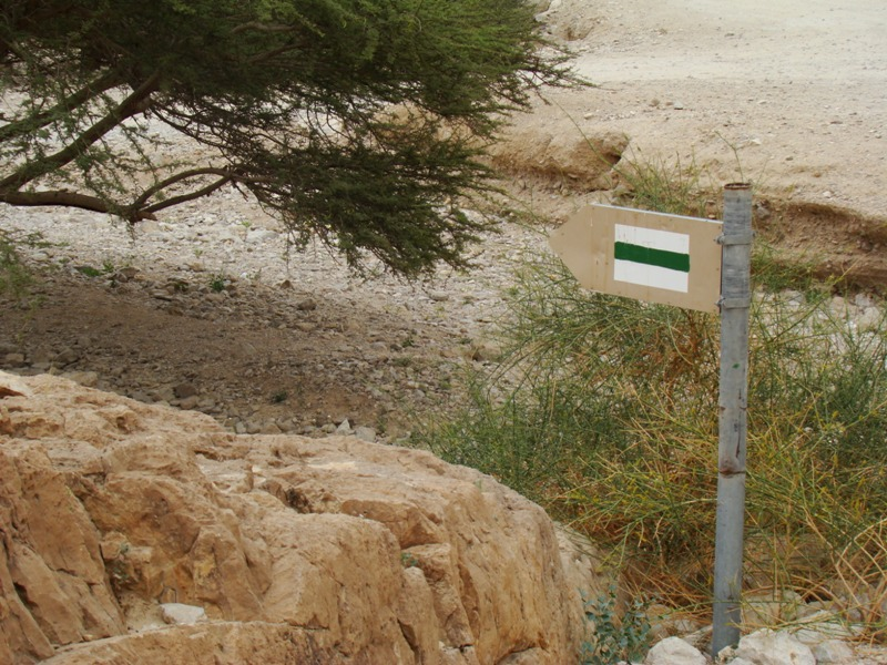 Izraelský turistický směrovník